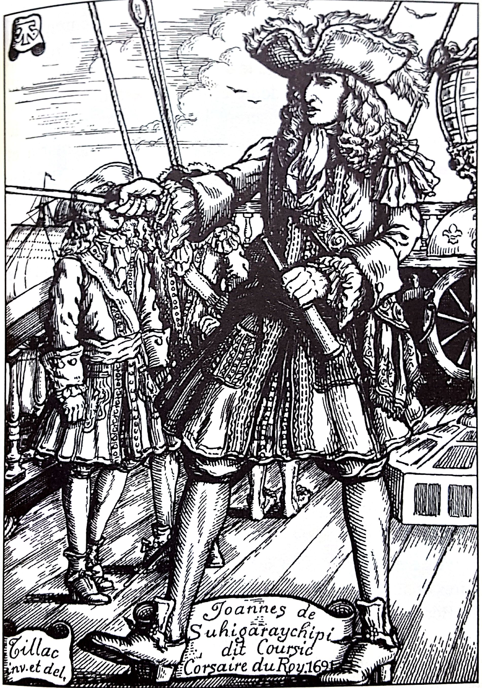 Dessin de Pablo Tillac (1880-1969) représentant Joannis de Suhigaraychipy, "corsaire du Roy".